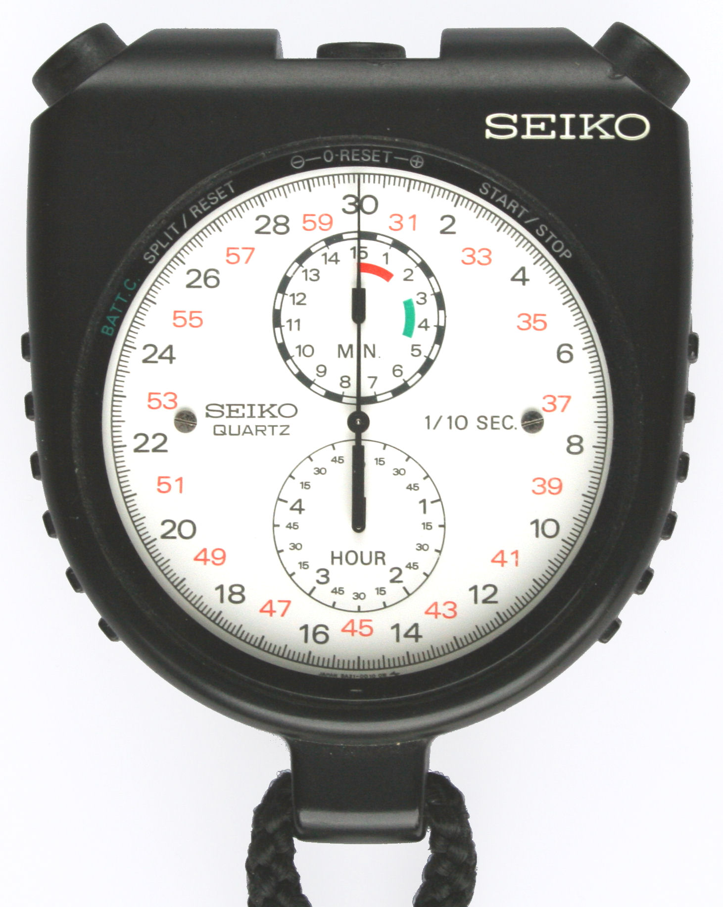 Analoge Stoppuhr mit Quartz-Uhrwerk, Seiko Siehe auch: image:Stoppuhr.jpg